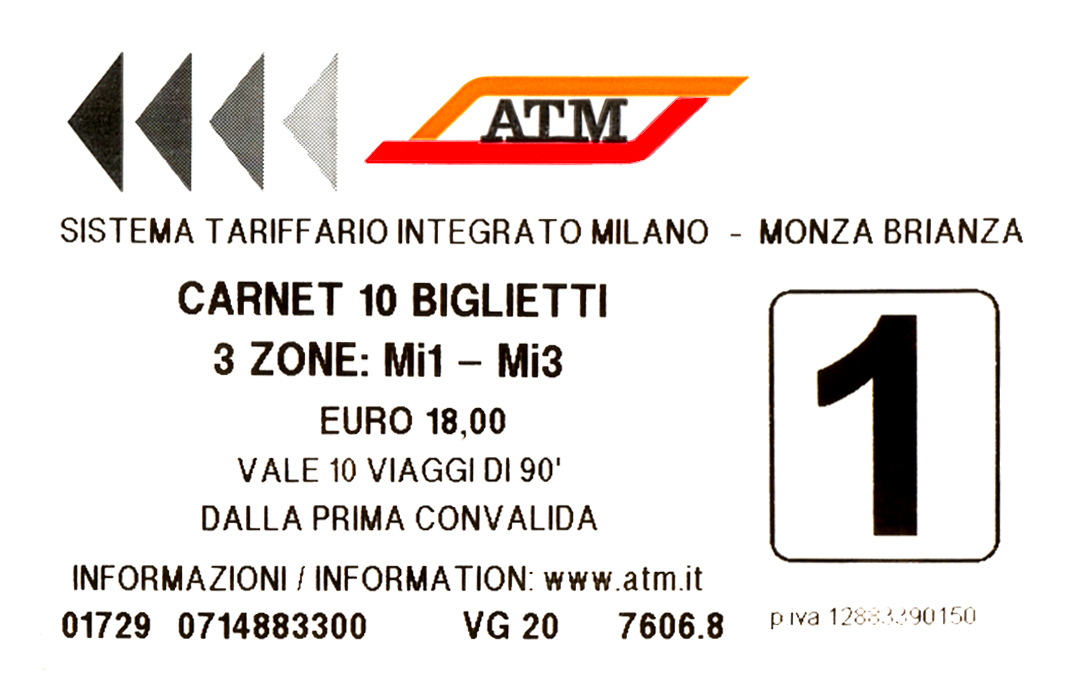 Ticket10-ATM-Milan